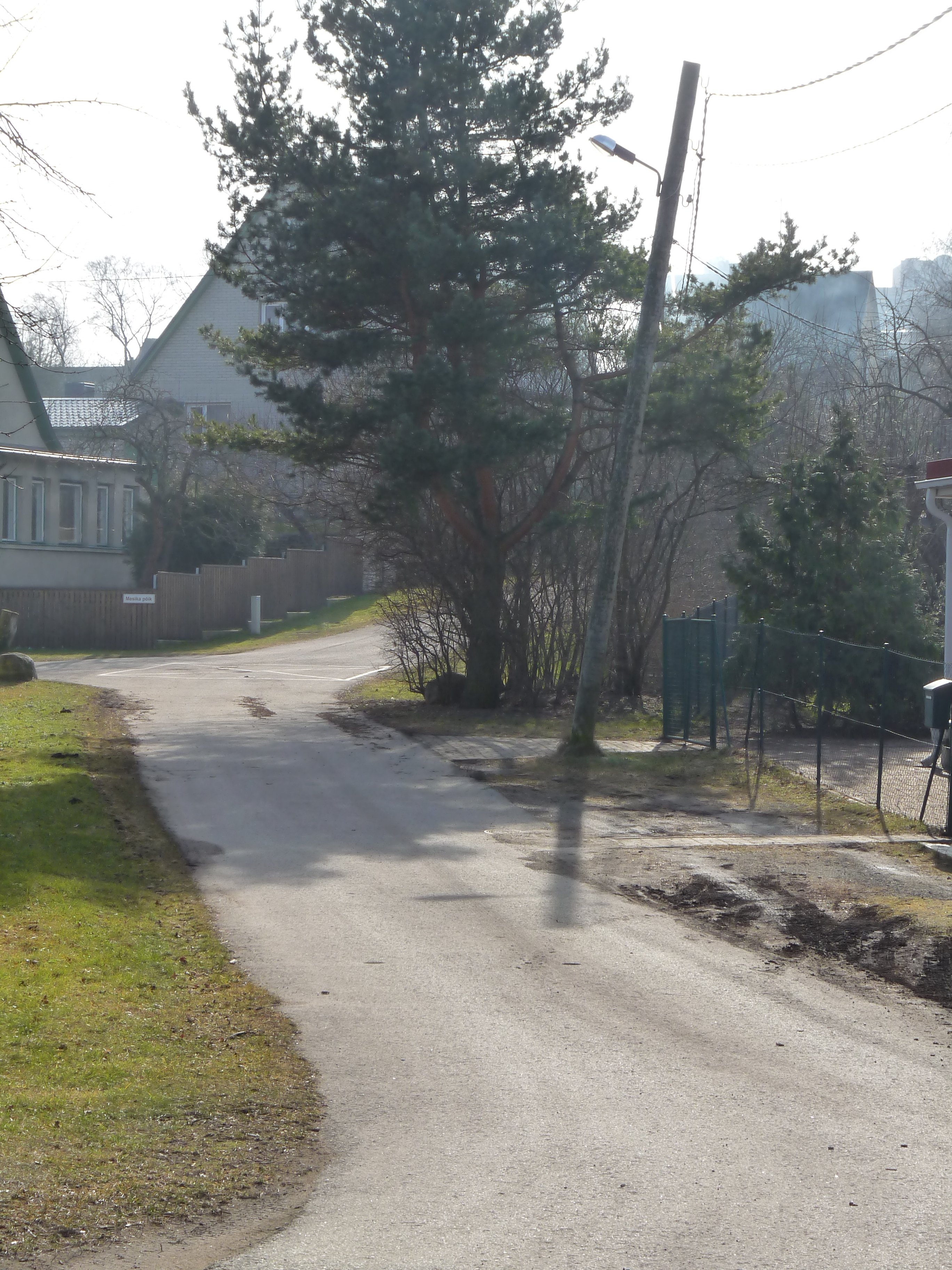 Helmiku side road in Tallinn, Estonia